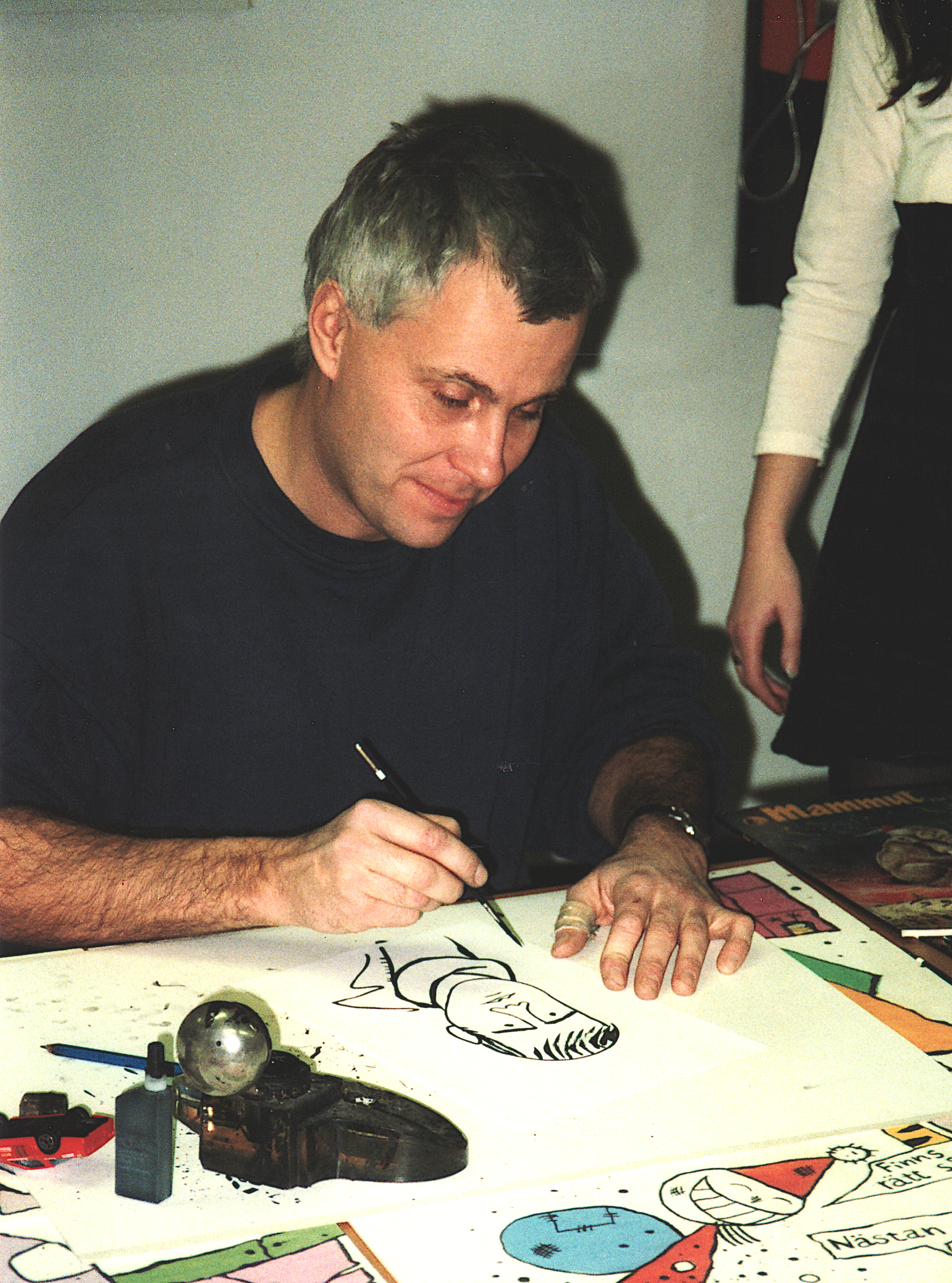 Serieskaparen och tecknaren Olle Berg. På Serie-Expo -91 satt han i sin egen förlagsmonter och tecknade snabbporträtt för 25 kronor styck.